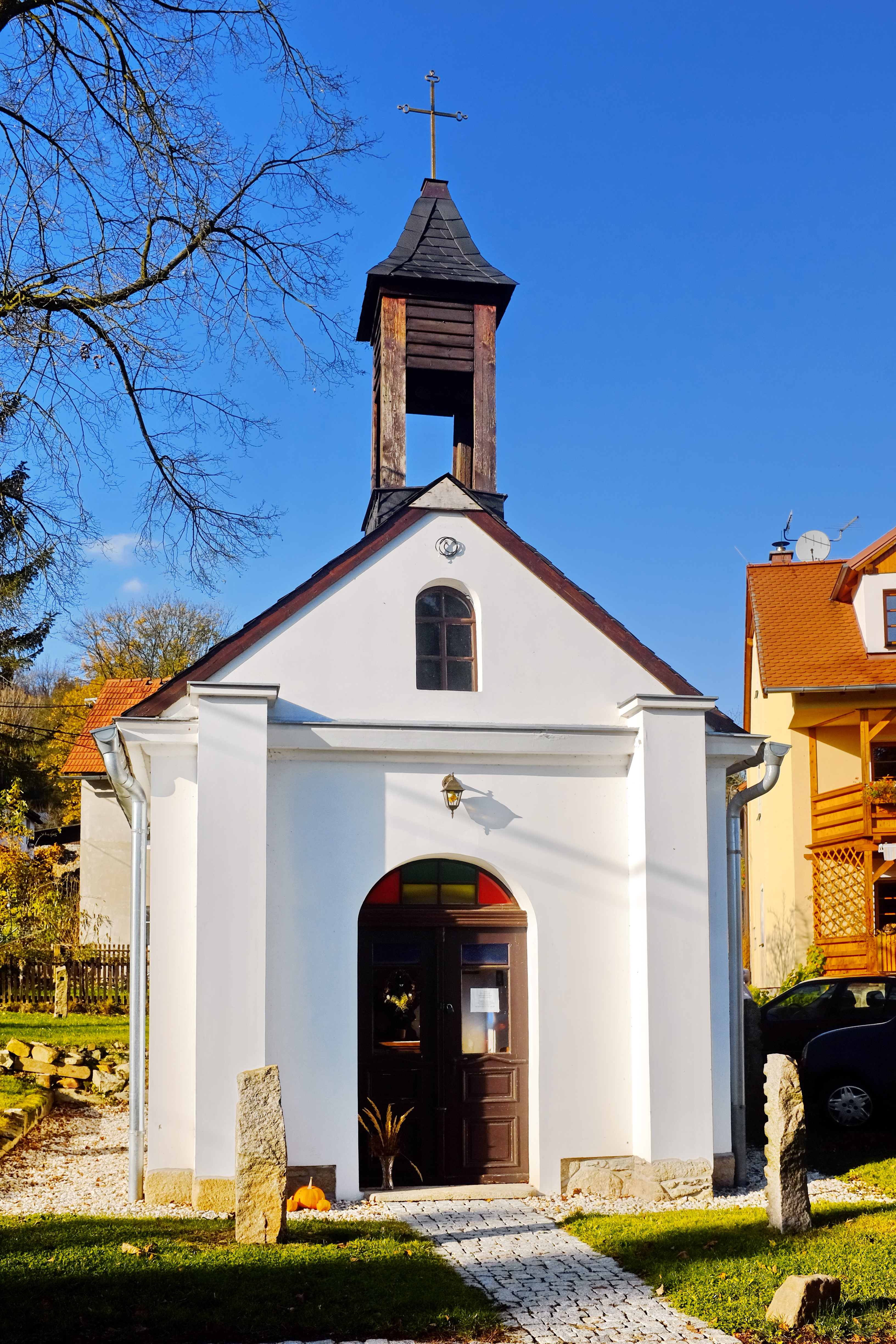 Kaplička v Nové Kyselce, části obce Kyselka, okres Karlovy Vary